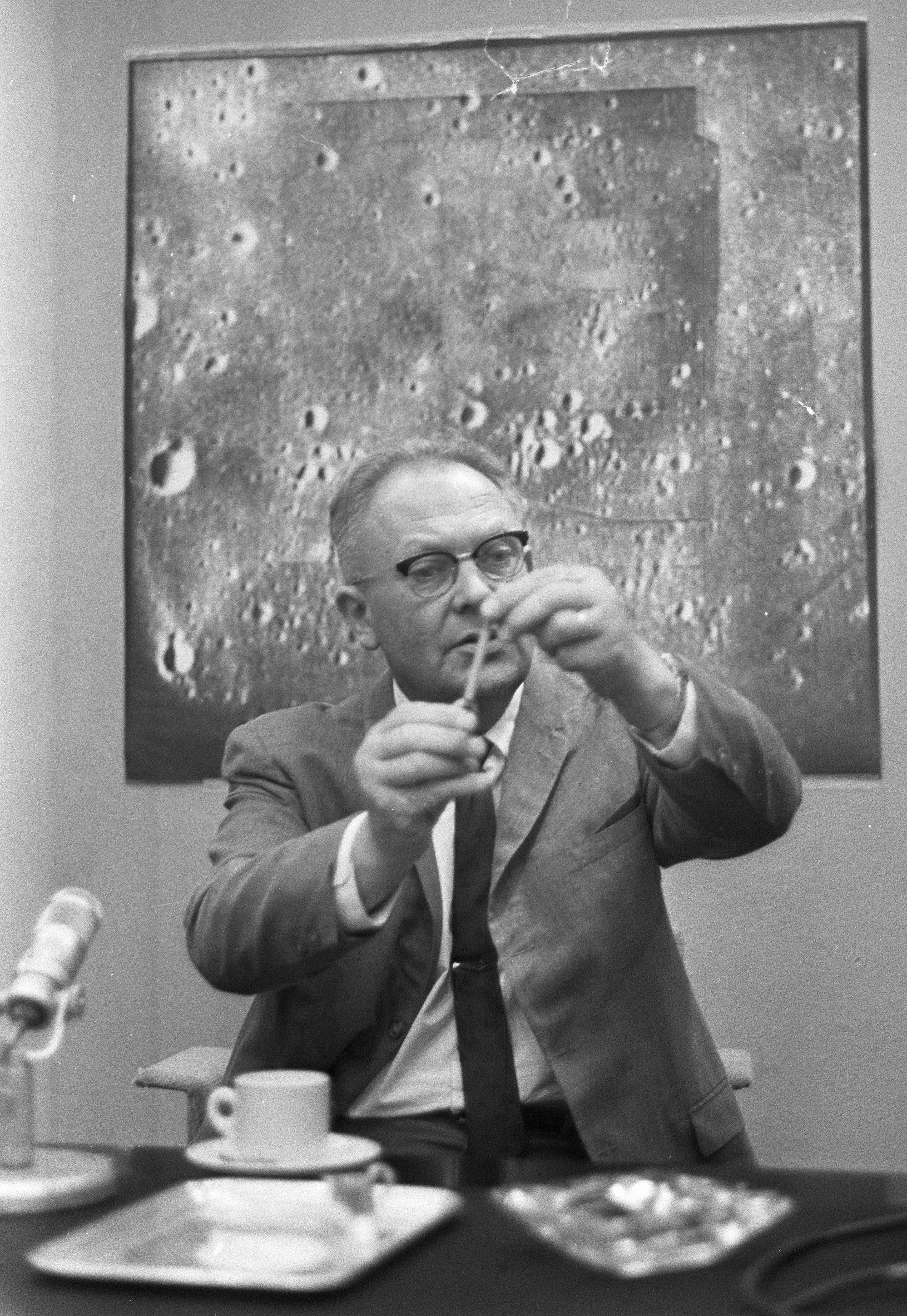 Aankomst prof. Kuiper op Schiphol, prof. Kuiper bij de maanfotos